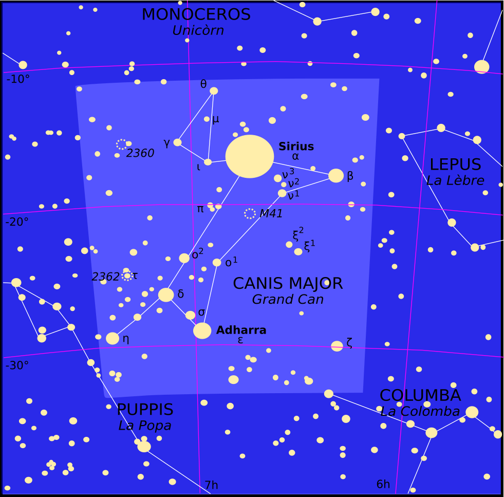 Constellacion dau Grand Can (Canis Major).